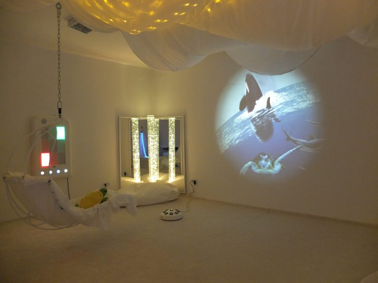 Snoezelen miestnosť